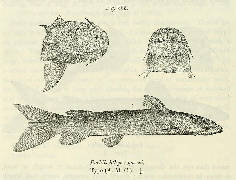 Euchilichthys royauxi